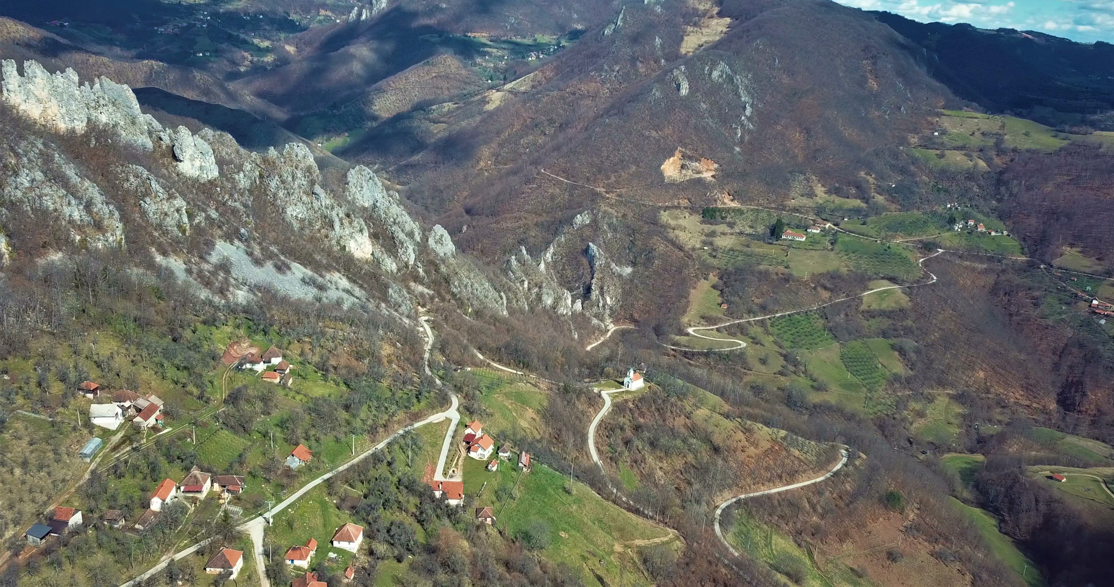 Blick auf die Landschaft im Einzugsgebiet des Flusses Rogačica